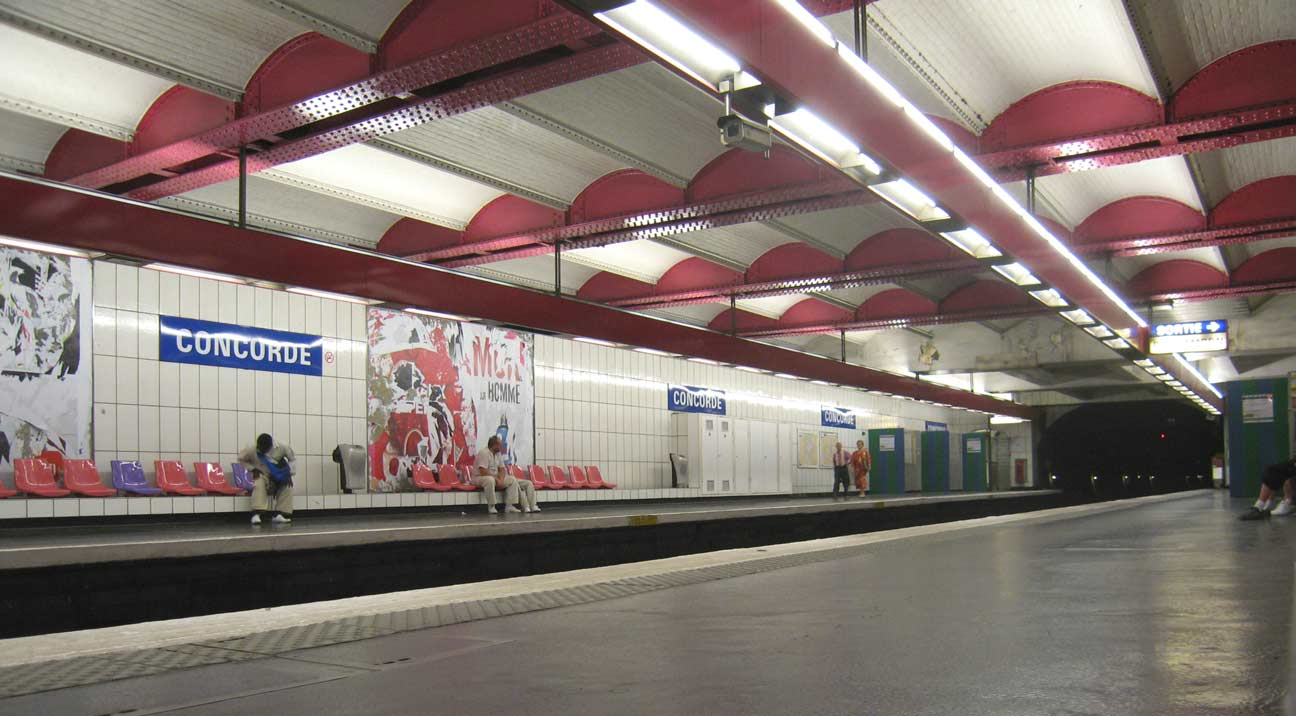 Metro de Paris Ligne 1 Station Concorde Lieu : Paris, France Date : Juin 2006 Auteur : Pline photo personnelle